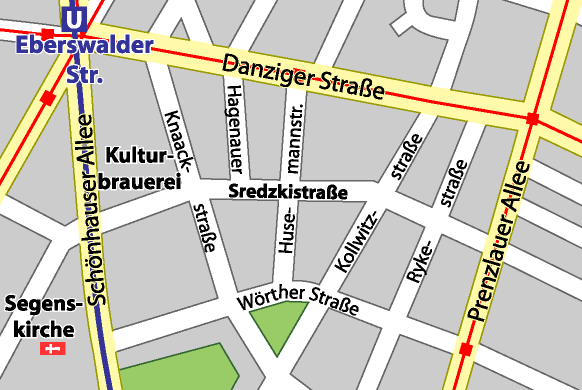 Karte der Sredzkistraße